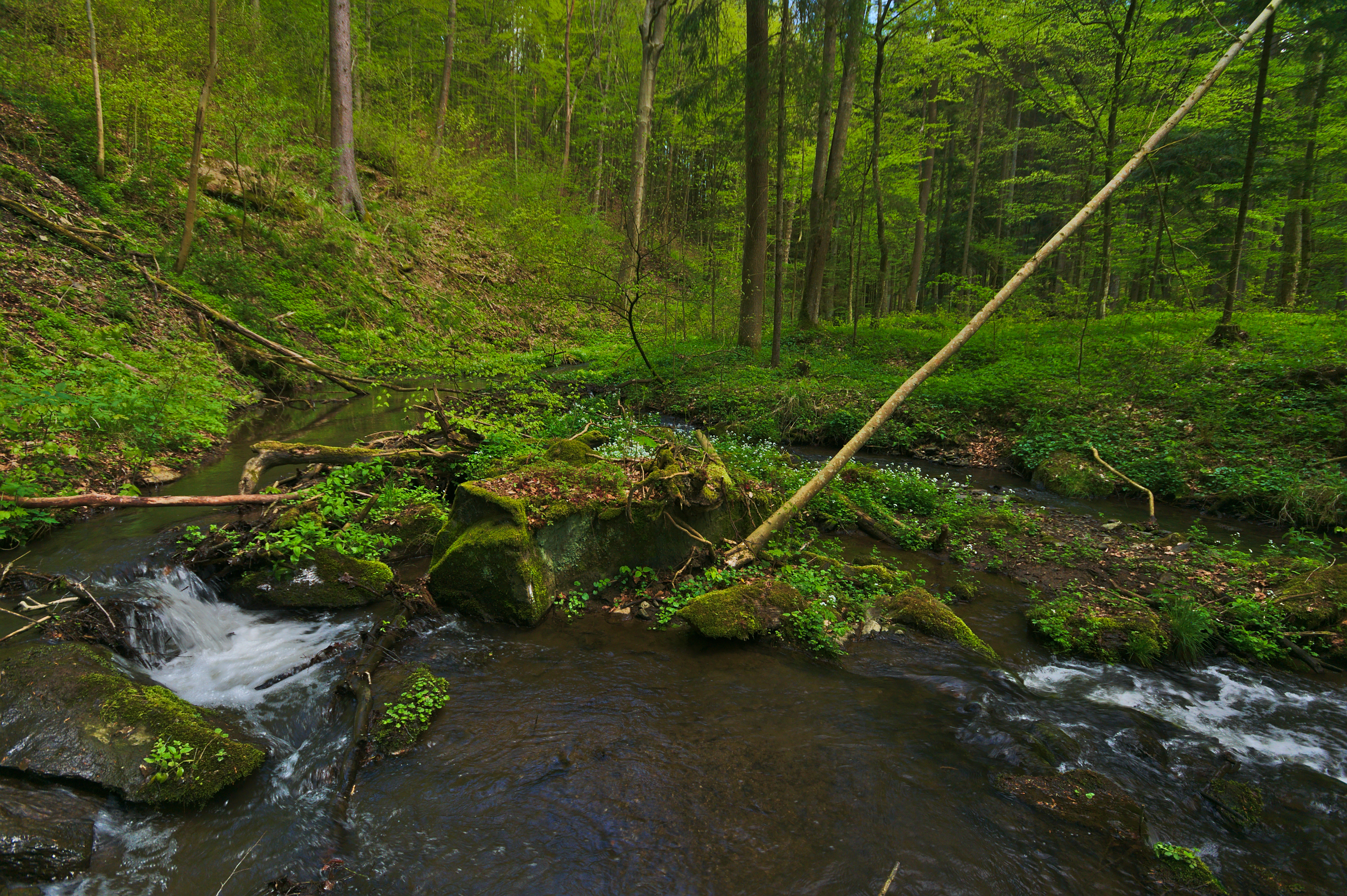 Tresenský potok, okres Žďár nad Sázavou